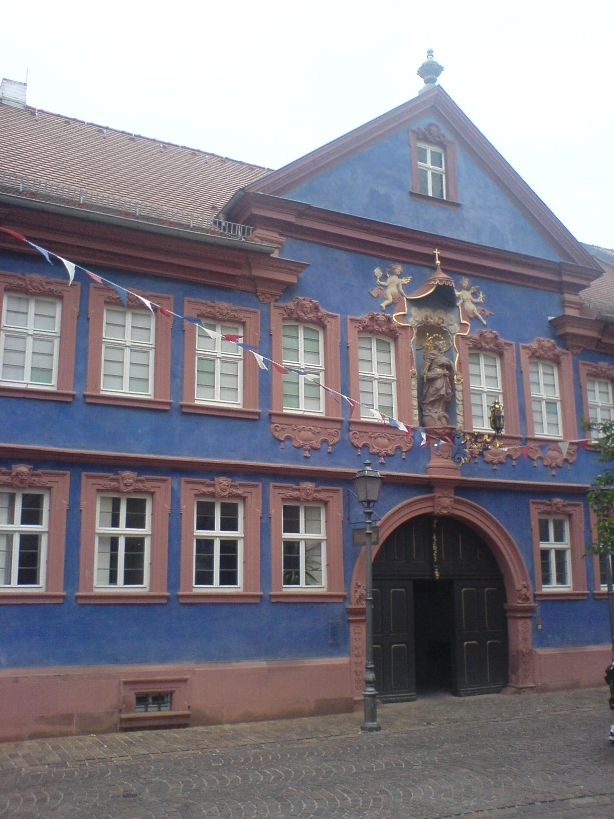 Franck-Haus Marktheidenfeld im August 2008, Teil der Fassade